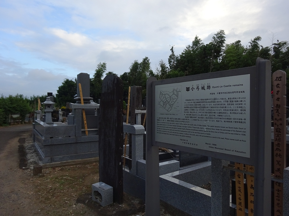 小弓城案内板